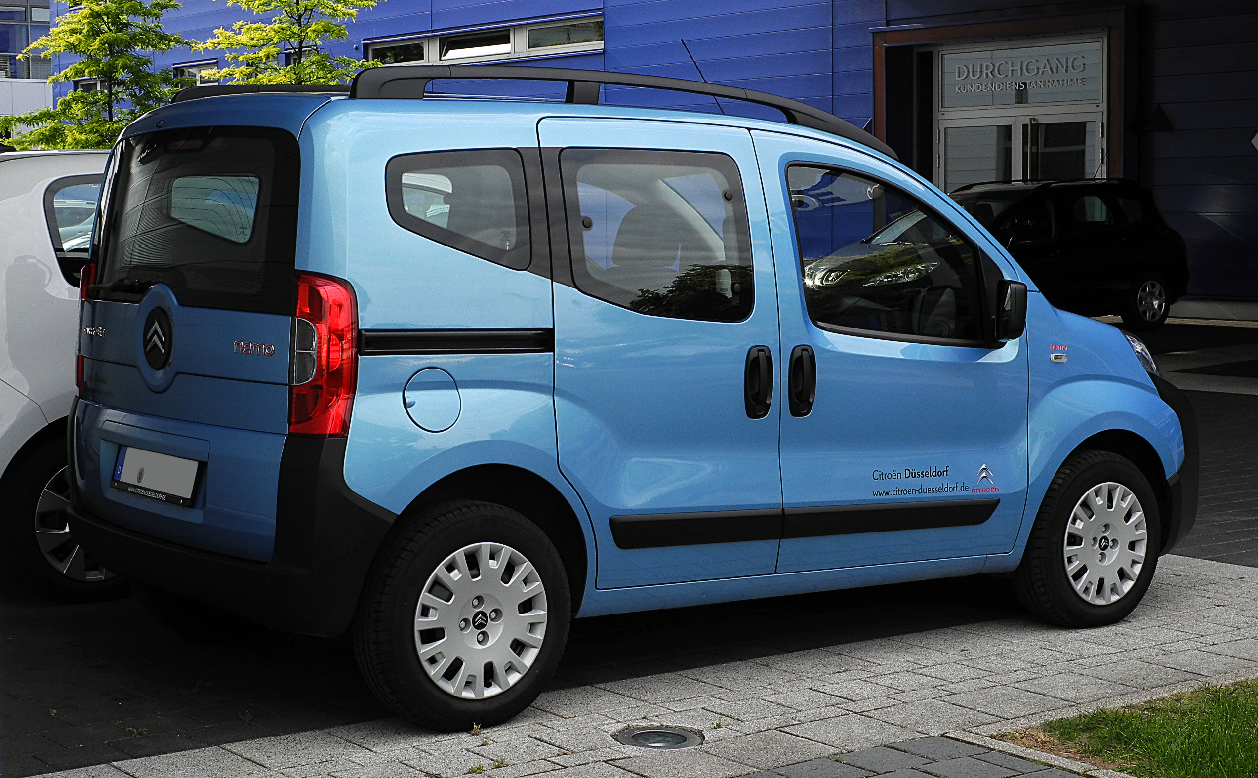 Citroën Nemo Kombi HDi 75 Multispace